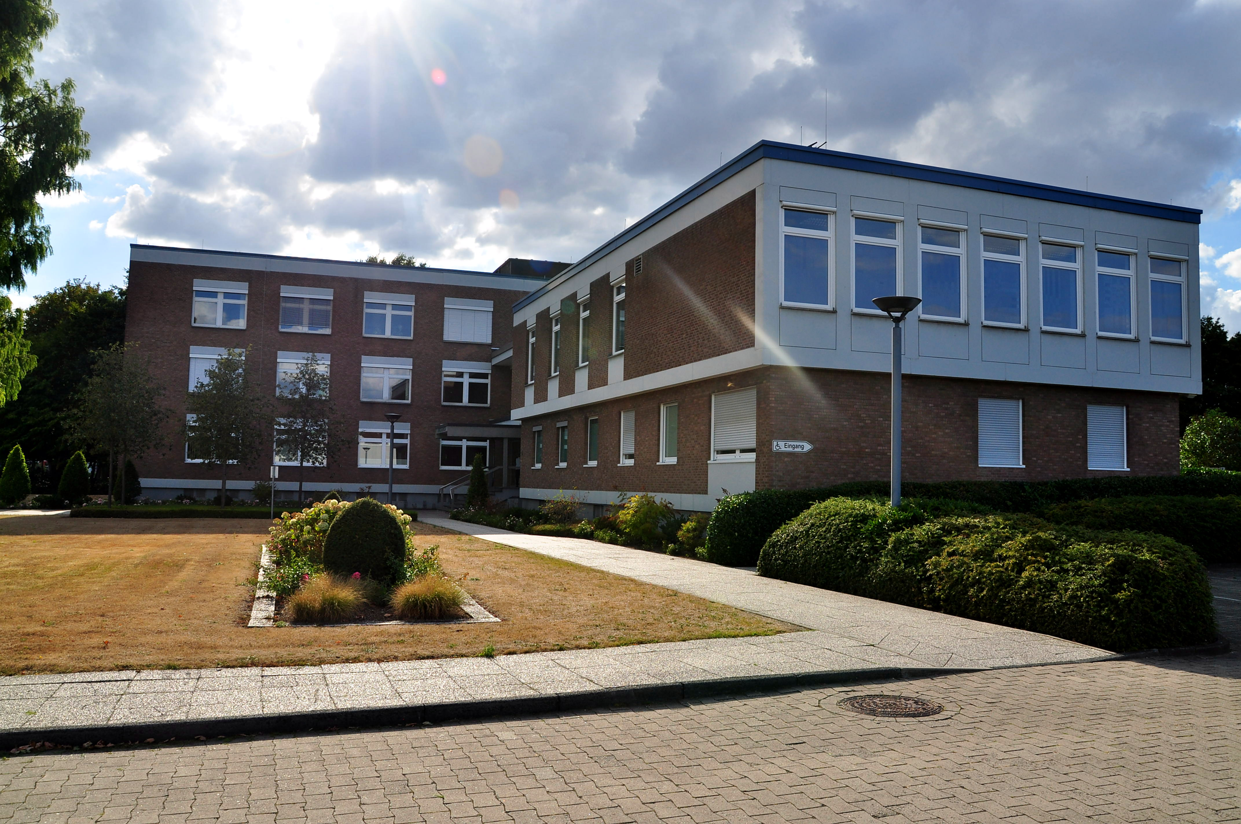 Amtsgericht in Lüdinghausen, Nordrhein-Westfalen